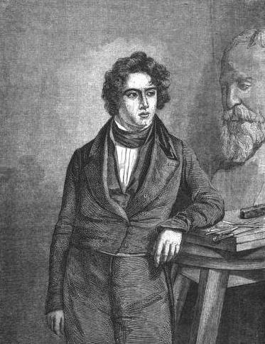 Jean-François Legendre-Héral.